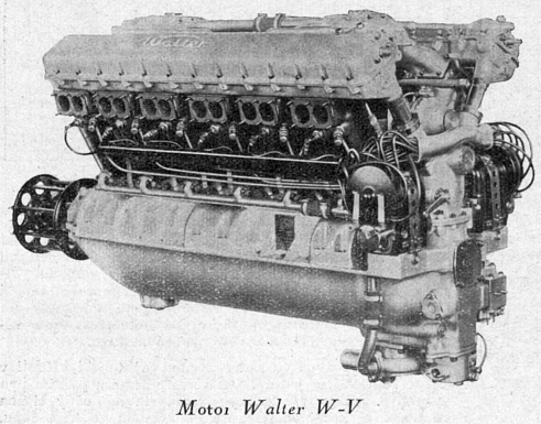 Walter W-V (1929), licence Fiat A.20